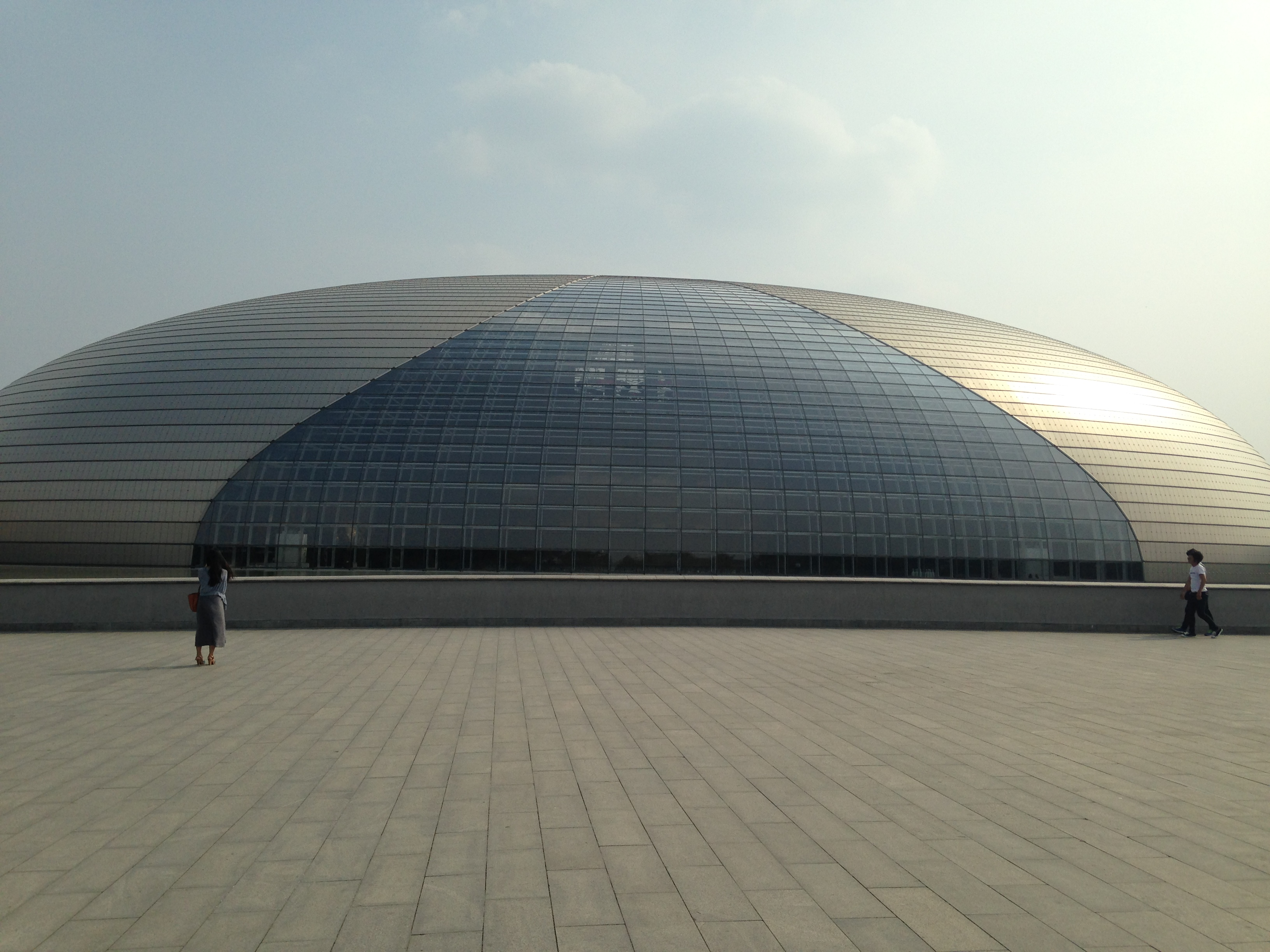 中国国家大劇院